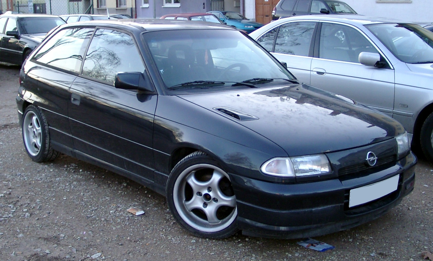 Opel Astra F GSI